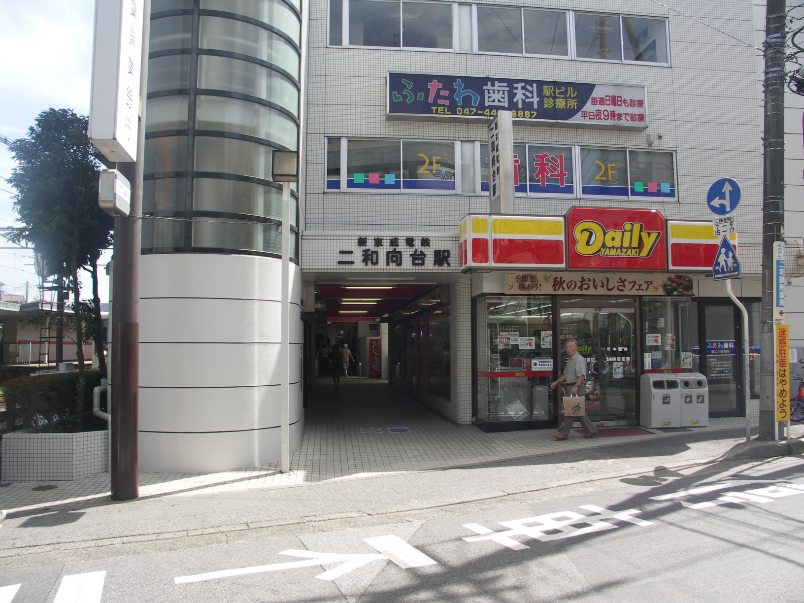 Futawa-Mukodai station, Shin-Keisei Line, Chiba, Japan, 二和向台駅